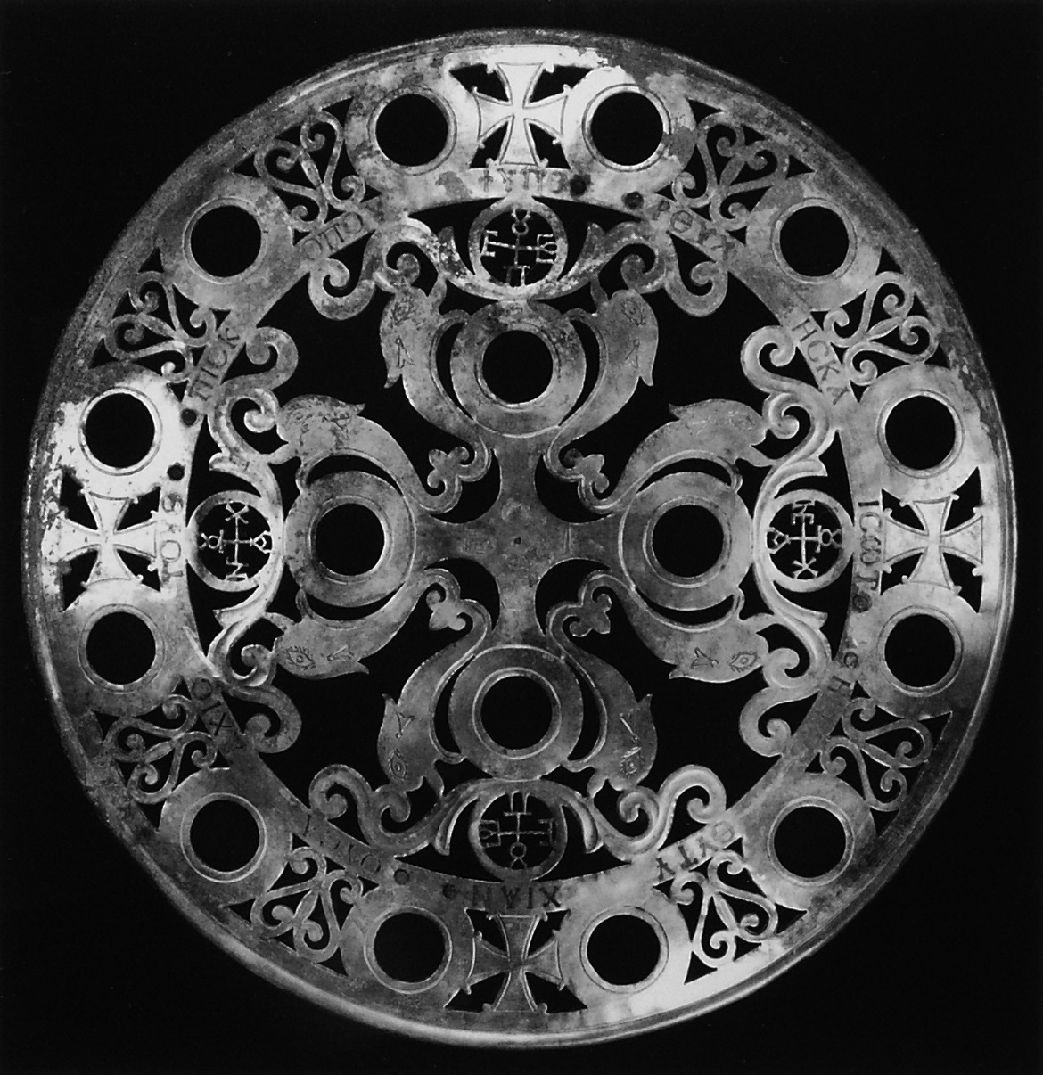 Kreisrunder Polykandelaber. Teil des Sion-Schatzes. 6th cent. A.D.